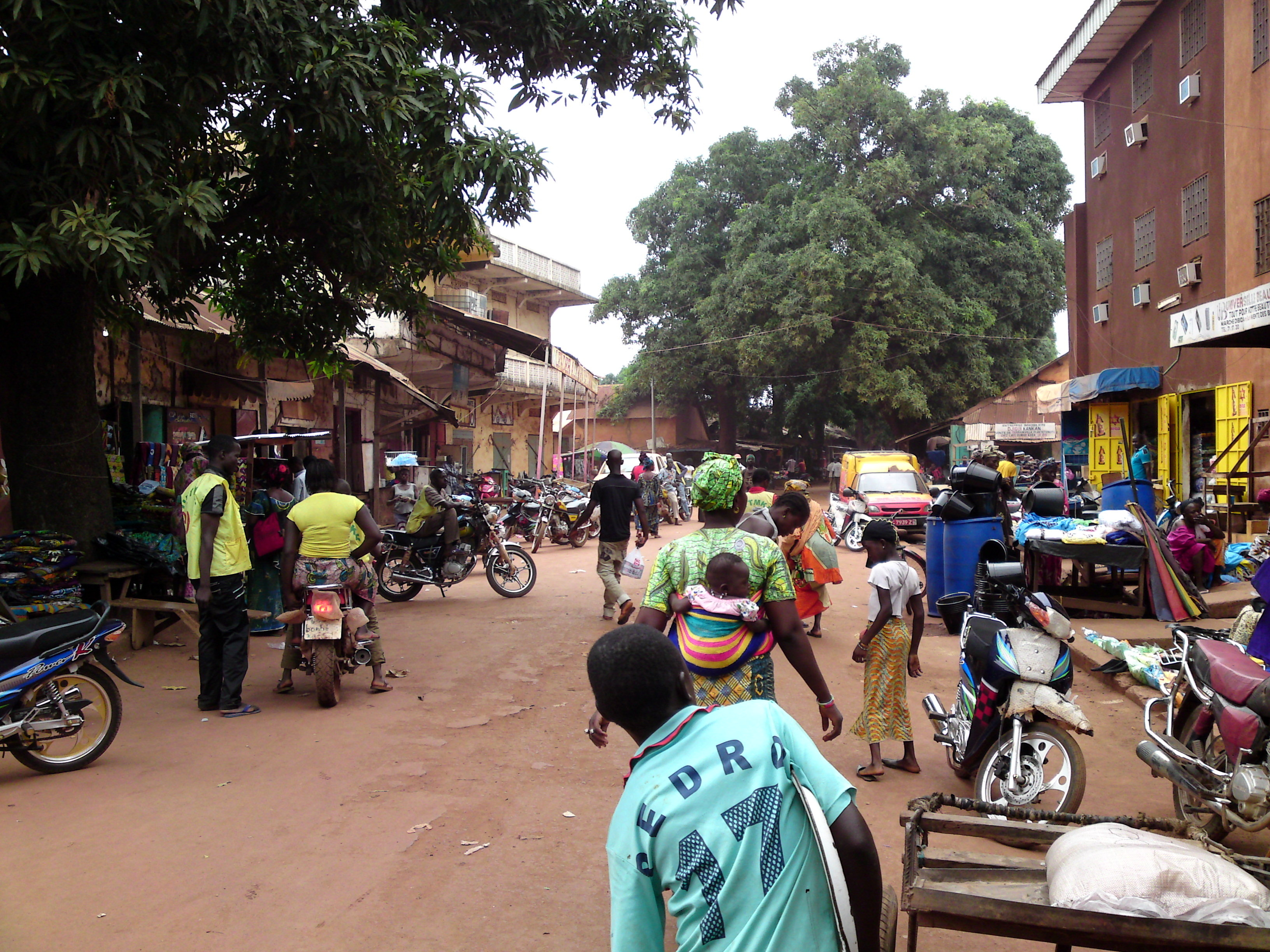 Kankan